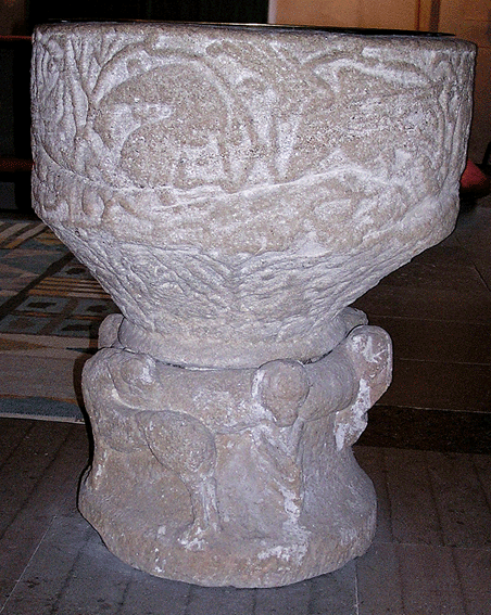 Dopfunten i Ytterselö kyrka är en av många 1100-talsdopfuntar som finns i svenska kyrkor. Dopfunt från 1100-talet.